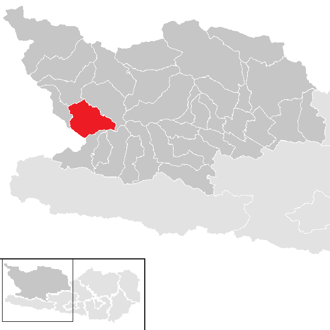 Bezirk Spittal an der Drau